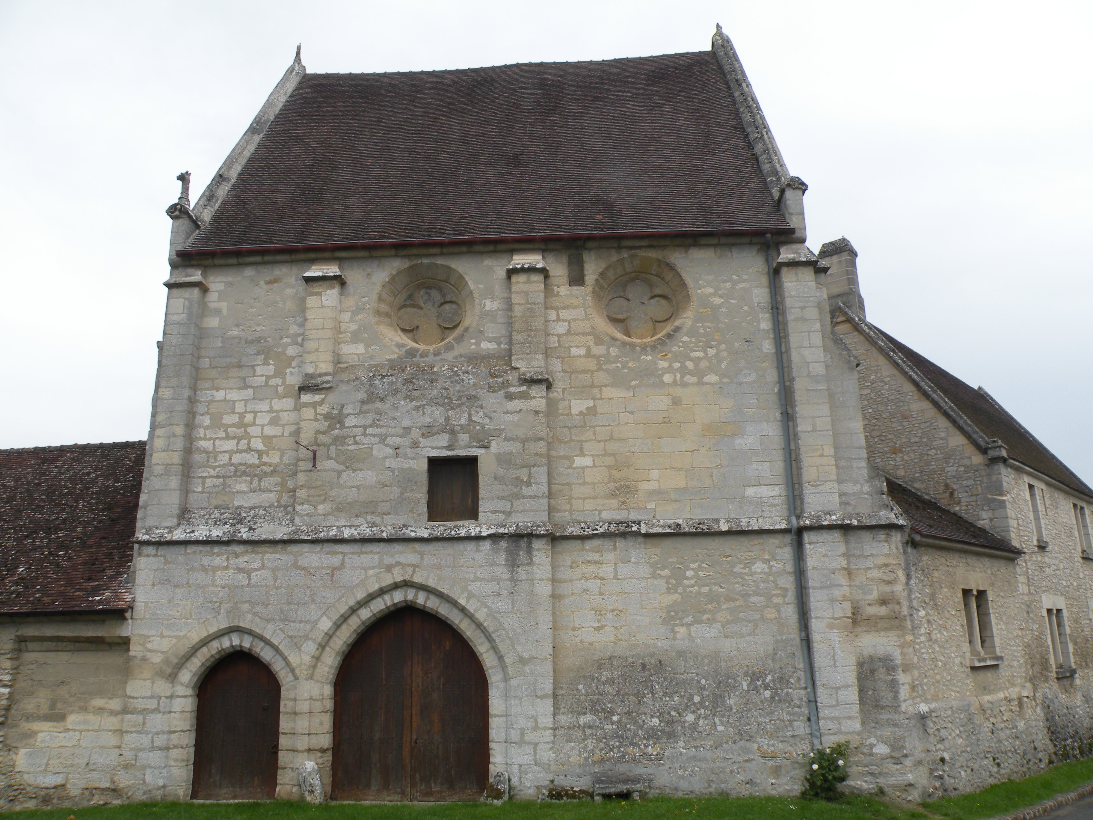 Chapelle Saint-Germer de Reilly .